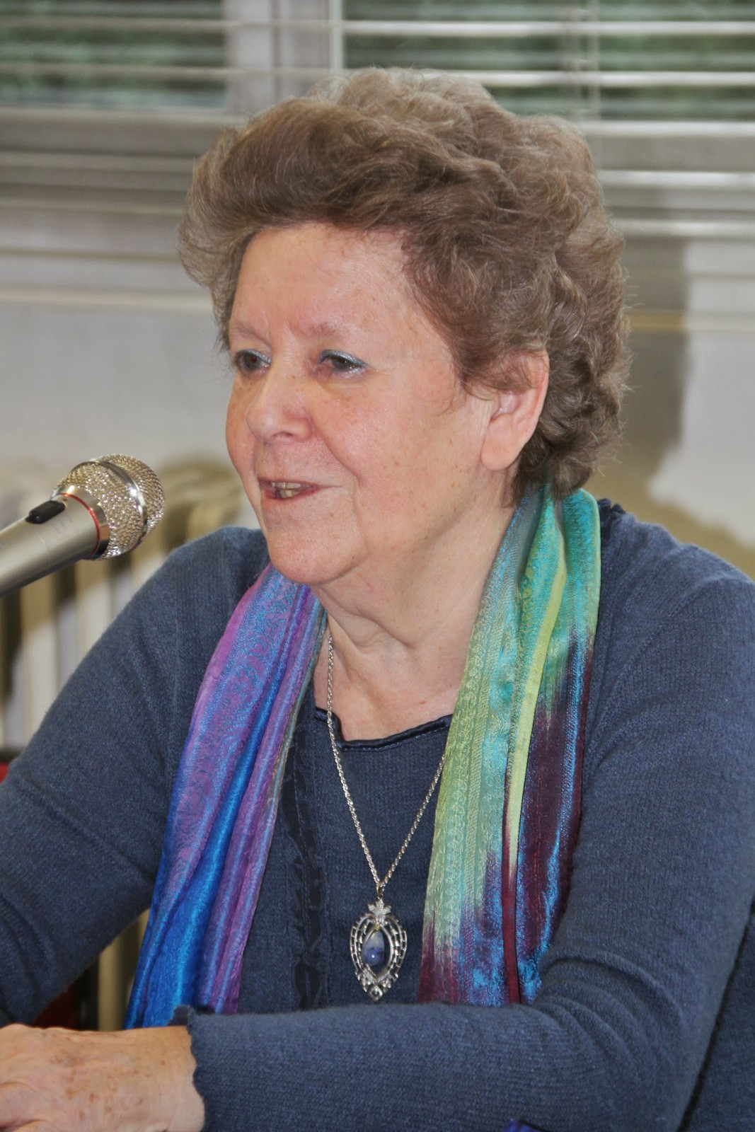 Arianna Szörényi durante un incontro in cui racconta la sua storia in una scuola.